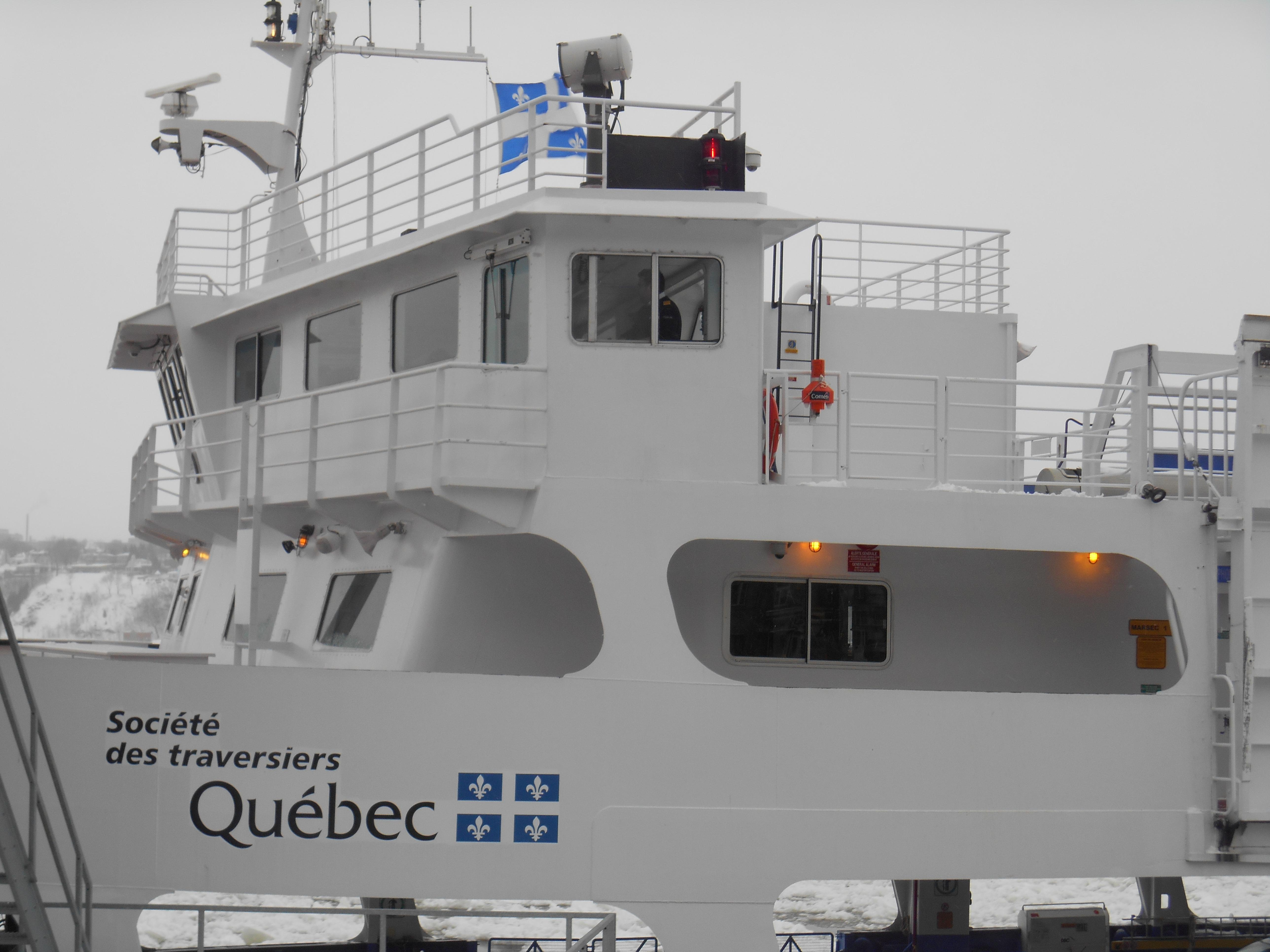 Le traversier Alphonse-Desjardins, vu de la gare fluviale de Québec